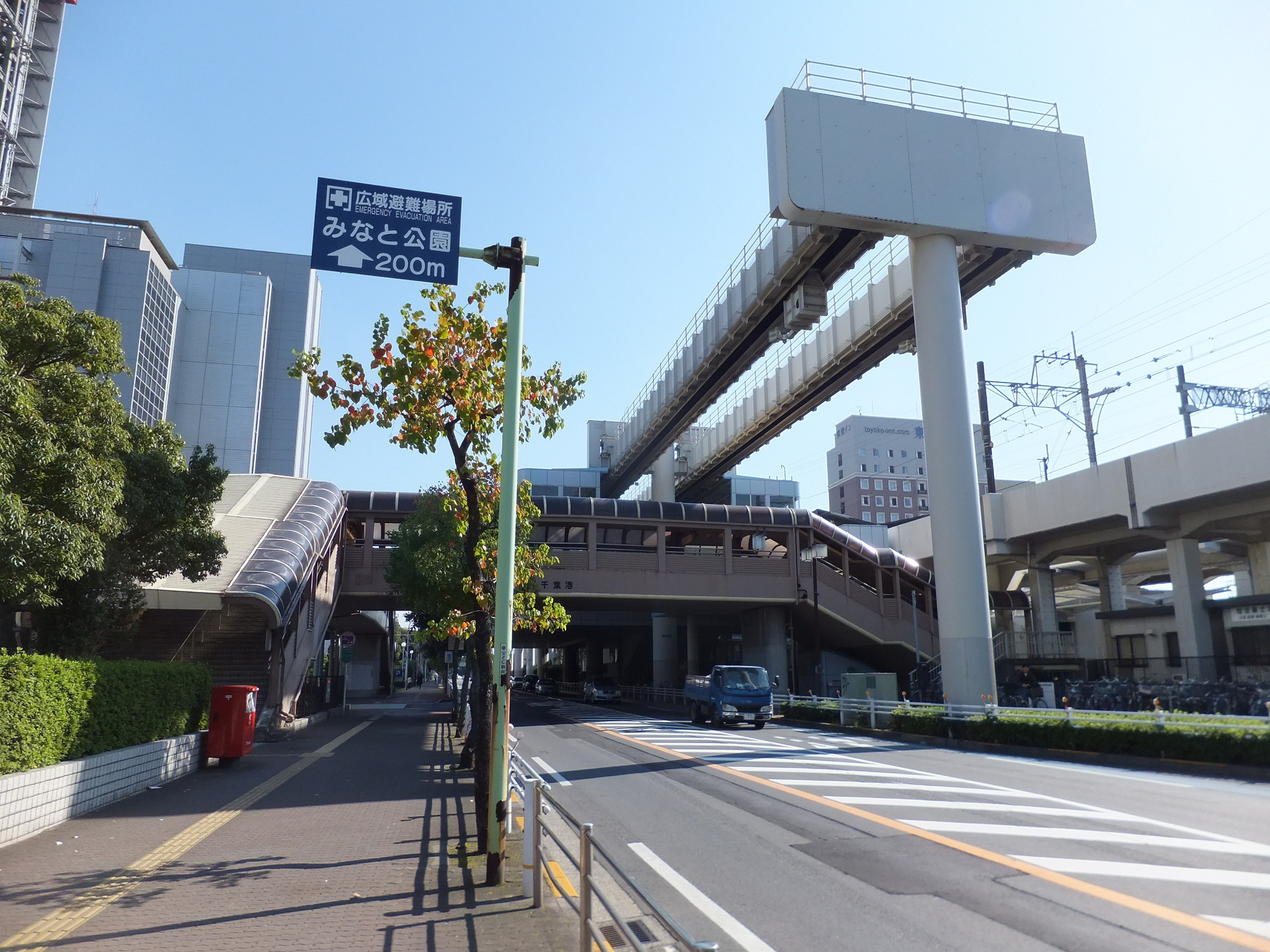 千葉都市モノレール千葉みなと駅、モノレール終端